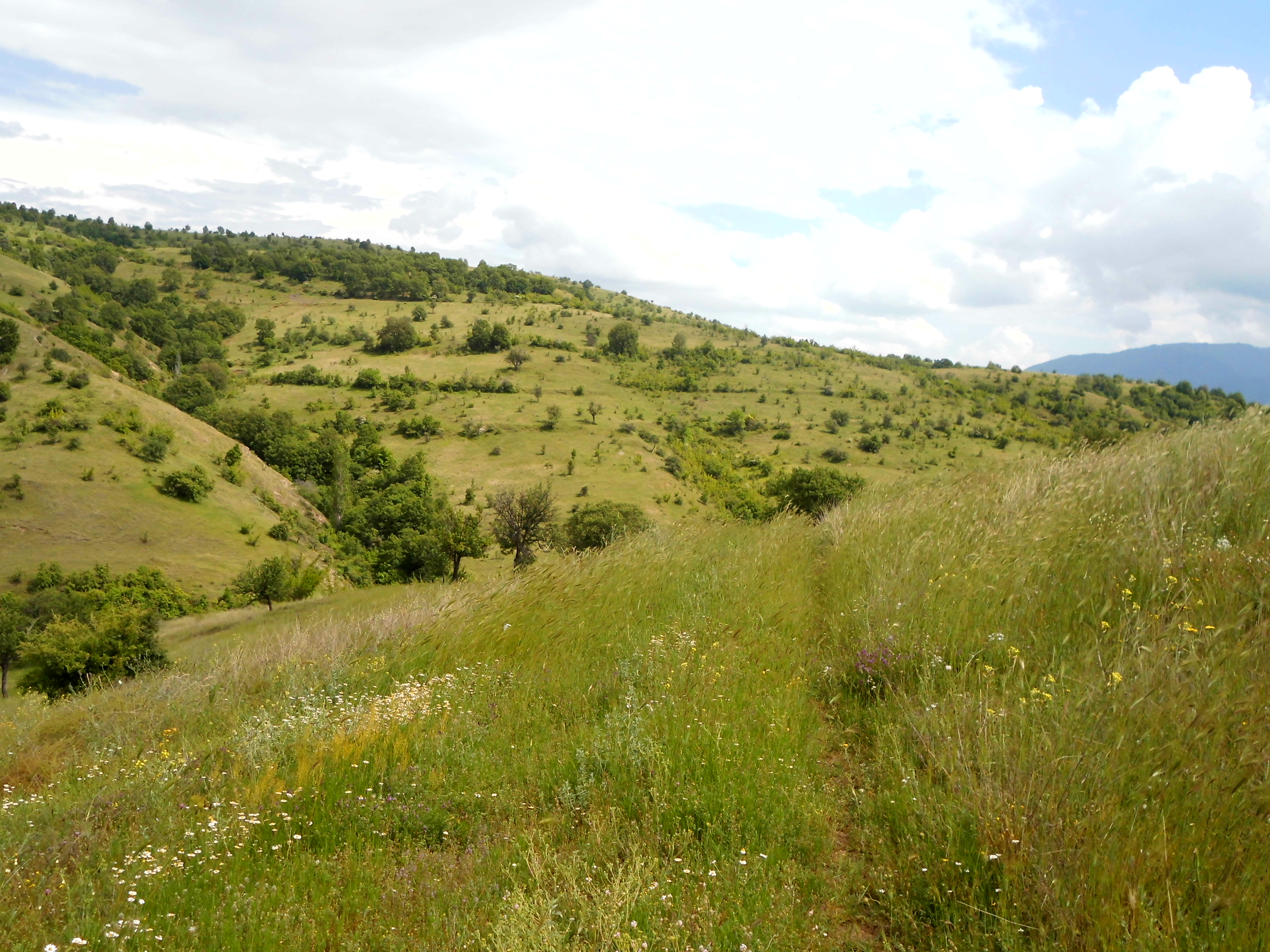 с. Виничка Кршла.